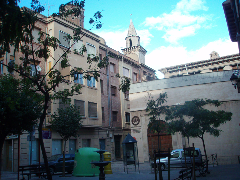 Plaza de San Jaime (Tudela), en 2010